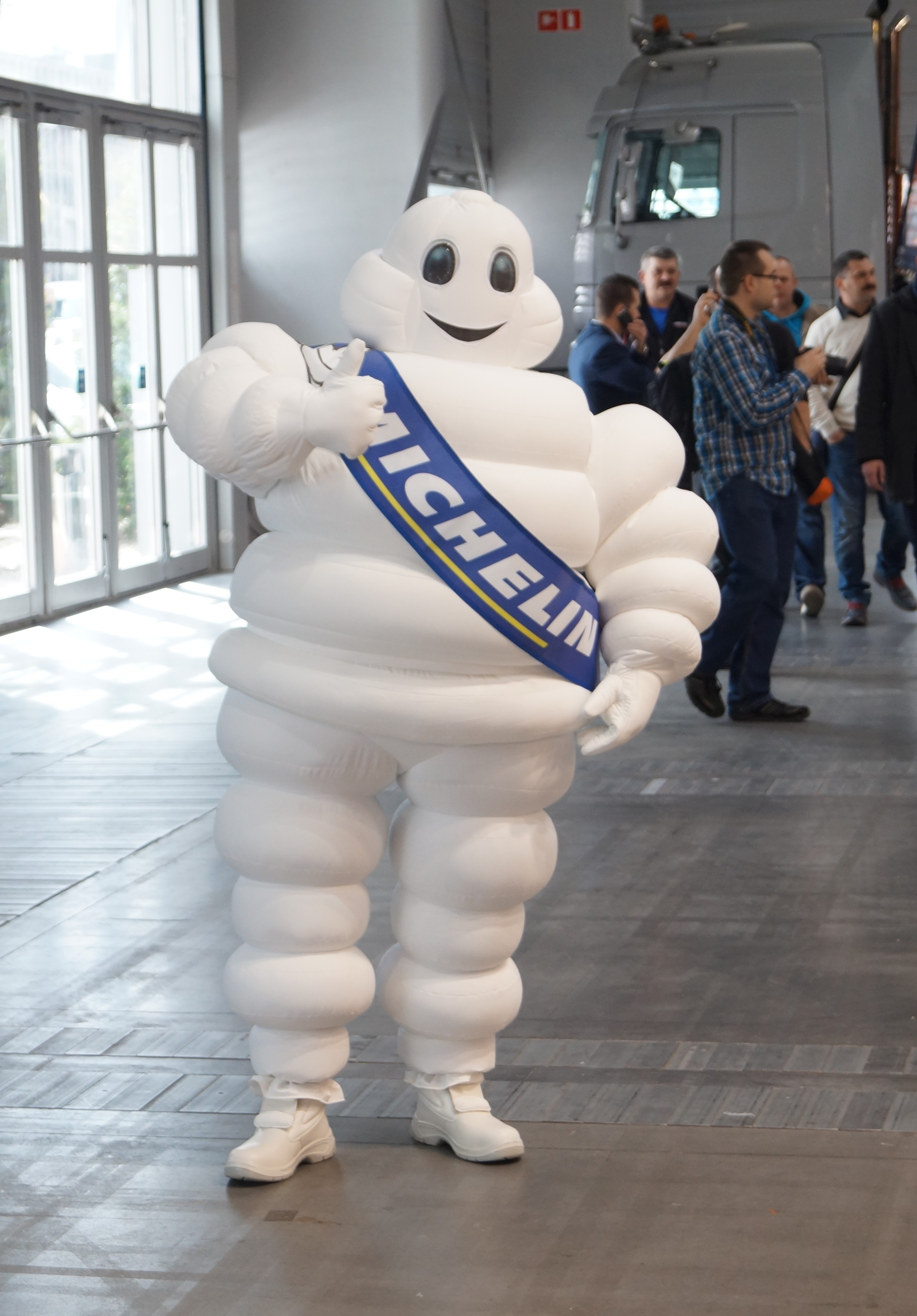 Bibendum, czyli ludzik Michelin na Motor Show Poznań 2017.